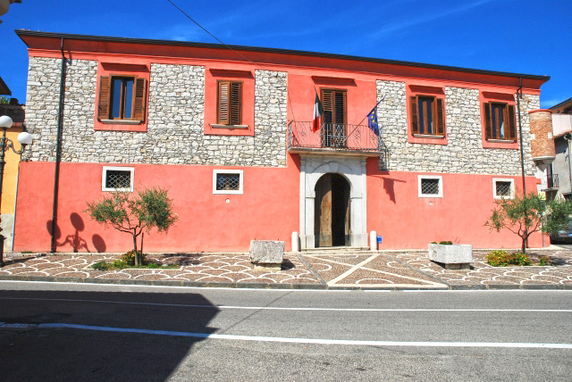 Palazzo Meomartini, Reino (BN), Italia